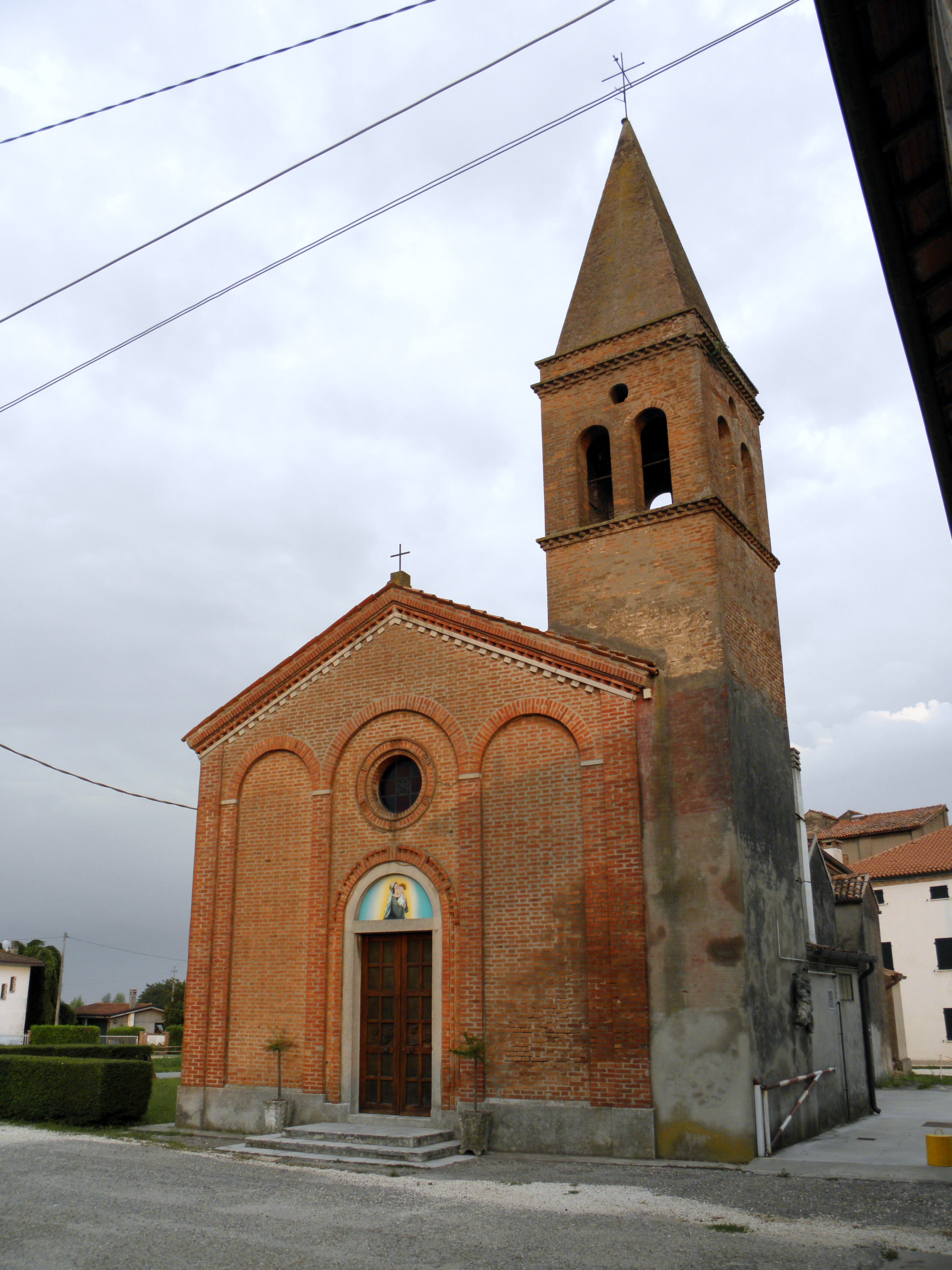 Raccano, frazione di Polesella: la chiesa alla Natività di Maria.